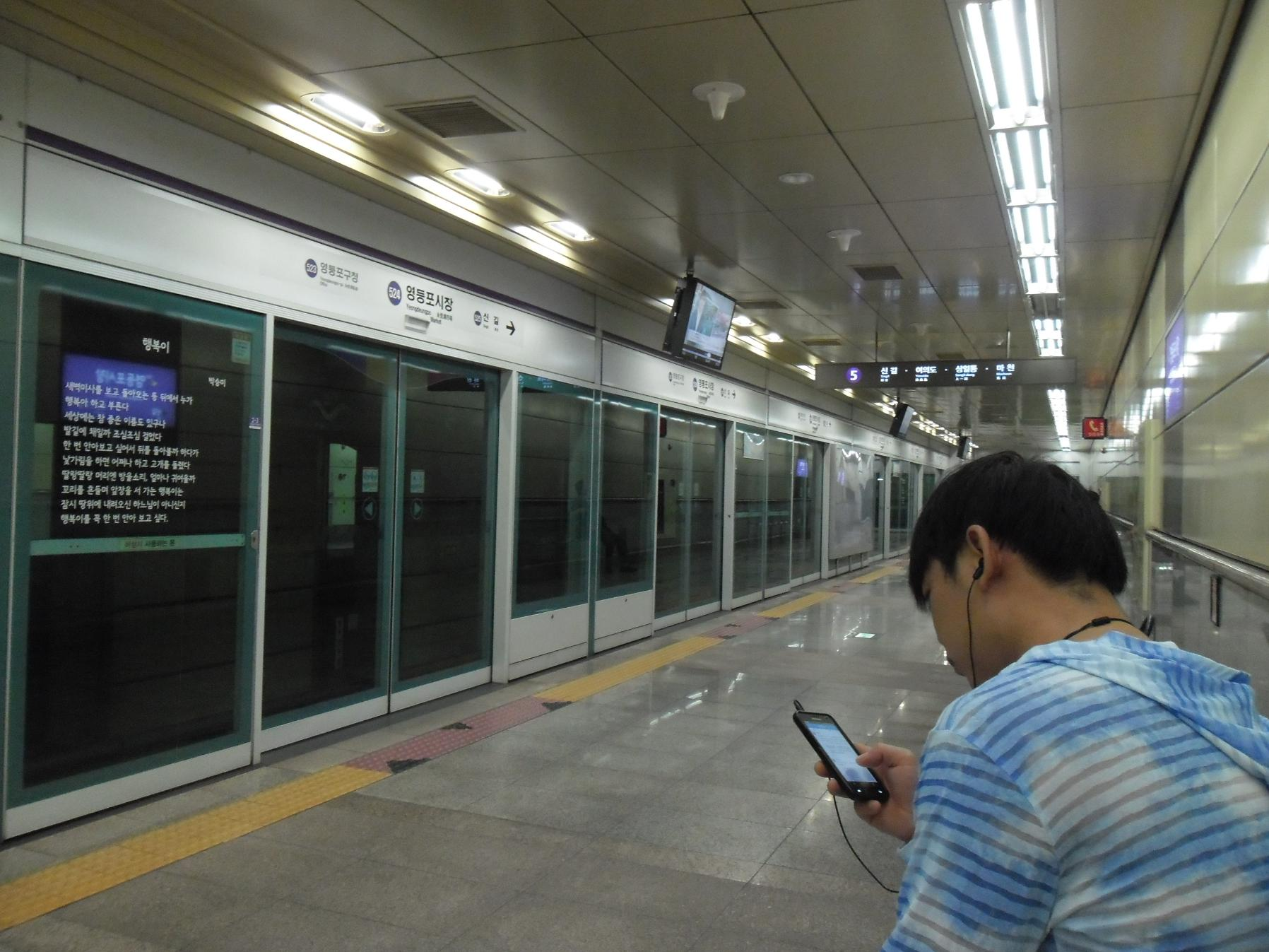 Hành lang chờ của tuyến tàu điện ngầm số 5 ở Seoul